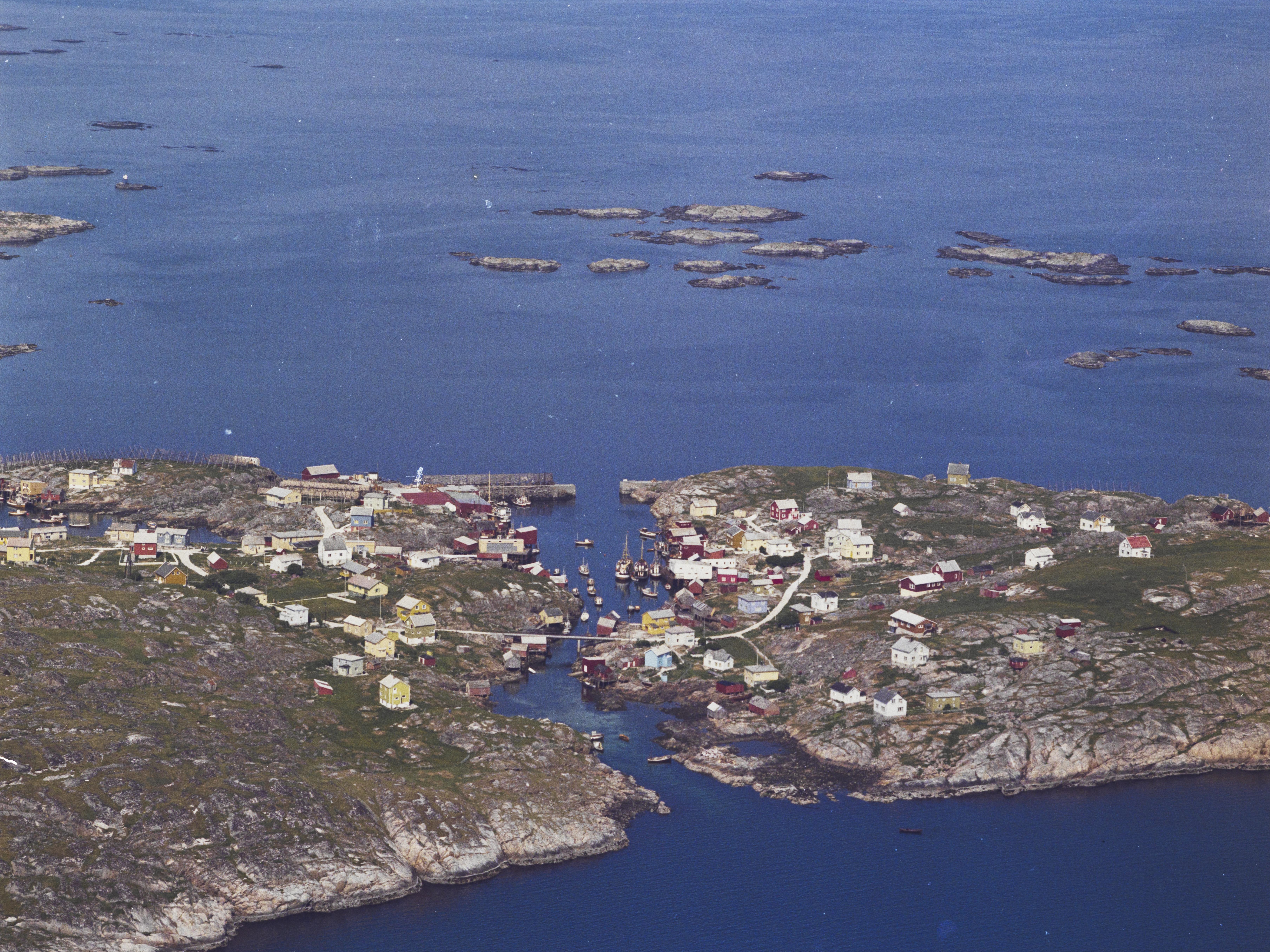 Mausundvær i Frøya kommune i Sør-Trøndelag fylke.